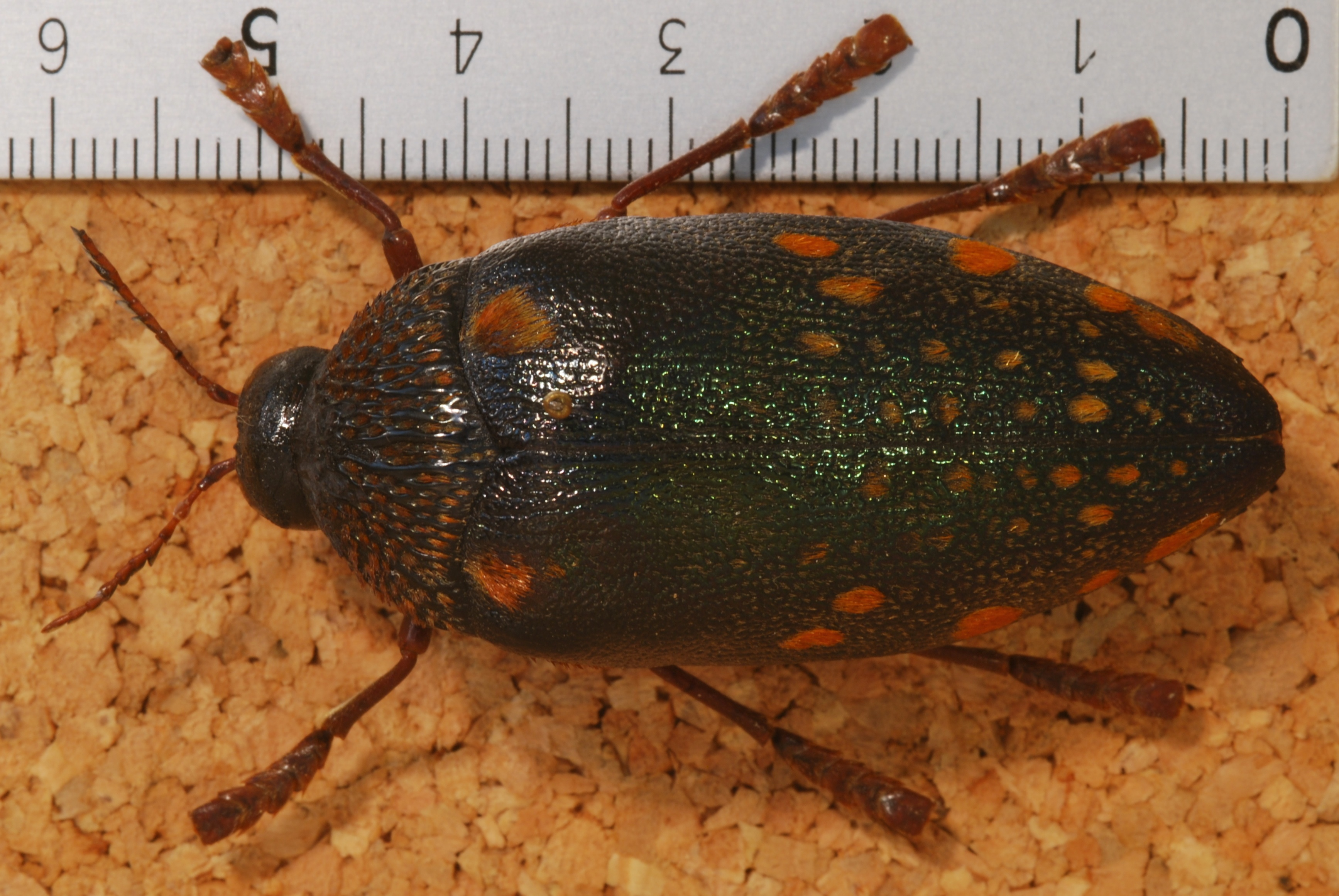 Gairo, Morogoro, TANZANIA